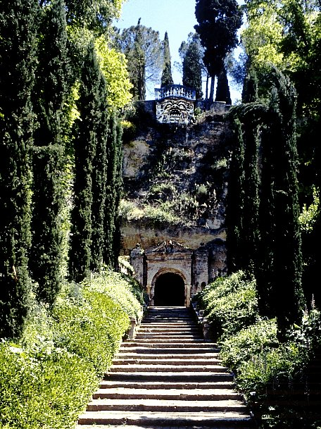 Verona, Giardino Giusti